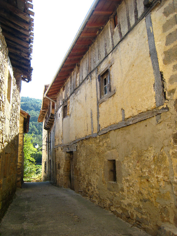 Imagen de San zadornil, Burgos.